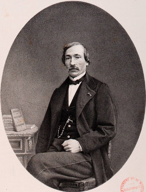 French violinist Jean-Delphin Alard (1815-1888)